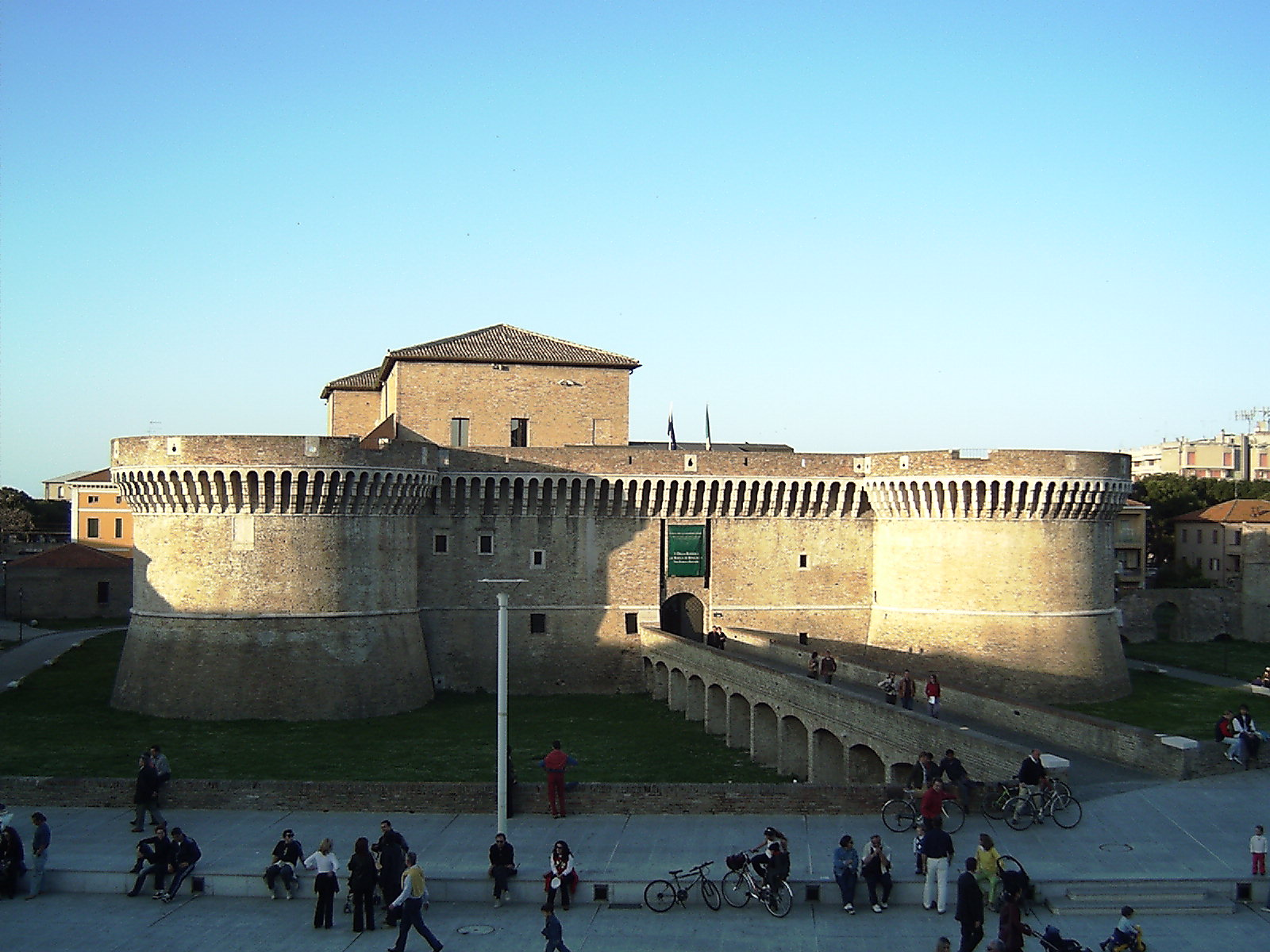 View of "Piazza del Duca" and the "Rocca Roveresca" from "Palazzo del Duca"